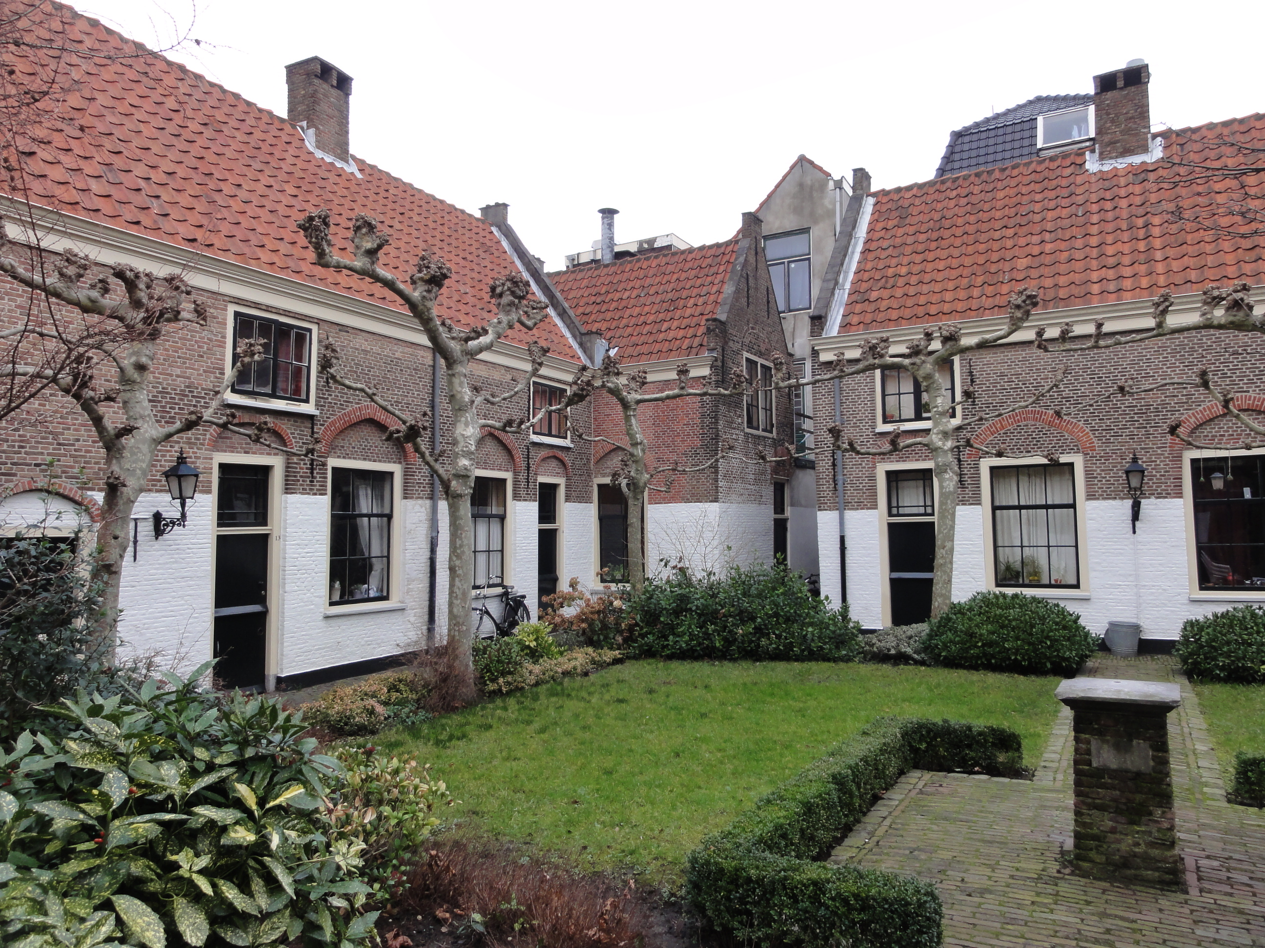 St. Salvatorshofje aan de Steenstraat 17 te Leiden